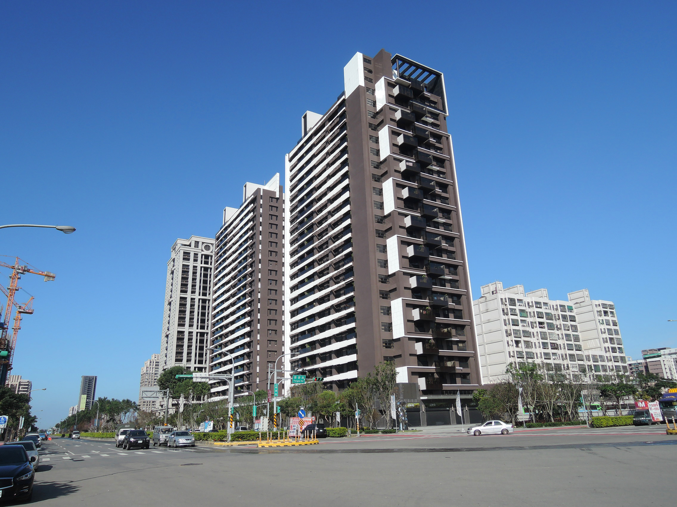 2019八德擴大都計劃